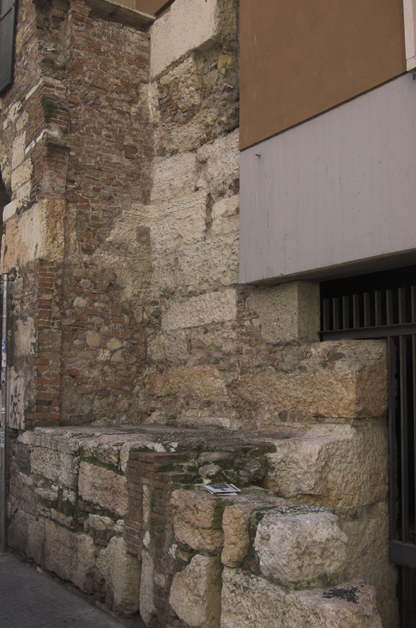 Mura romane a Verona